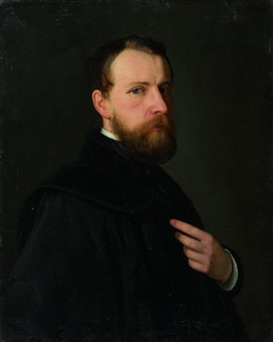 Heinrich Ferdinand Hofmann: Selbstporträt mit schwarzem Umhang. Bezeichnet unten rechts: H. Hofmann. Öl auf Leinwand. 67 x 54 cm.